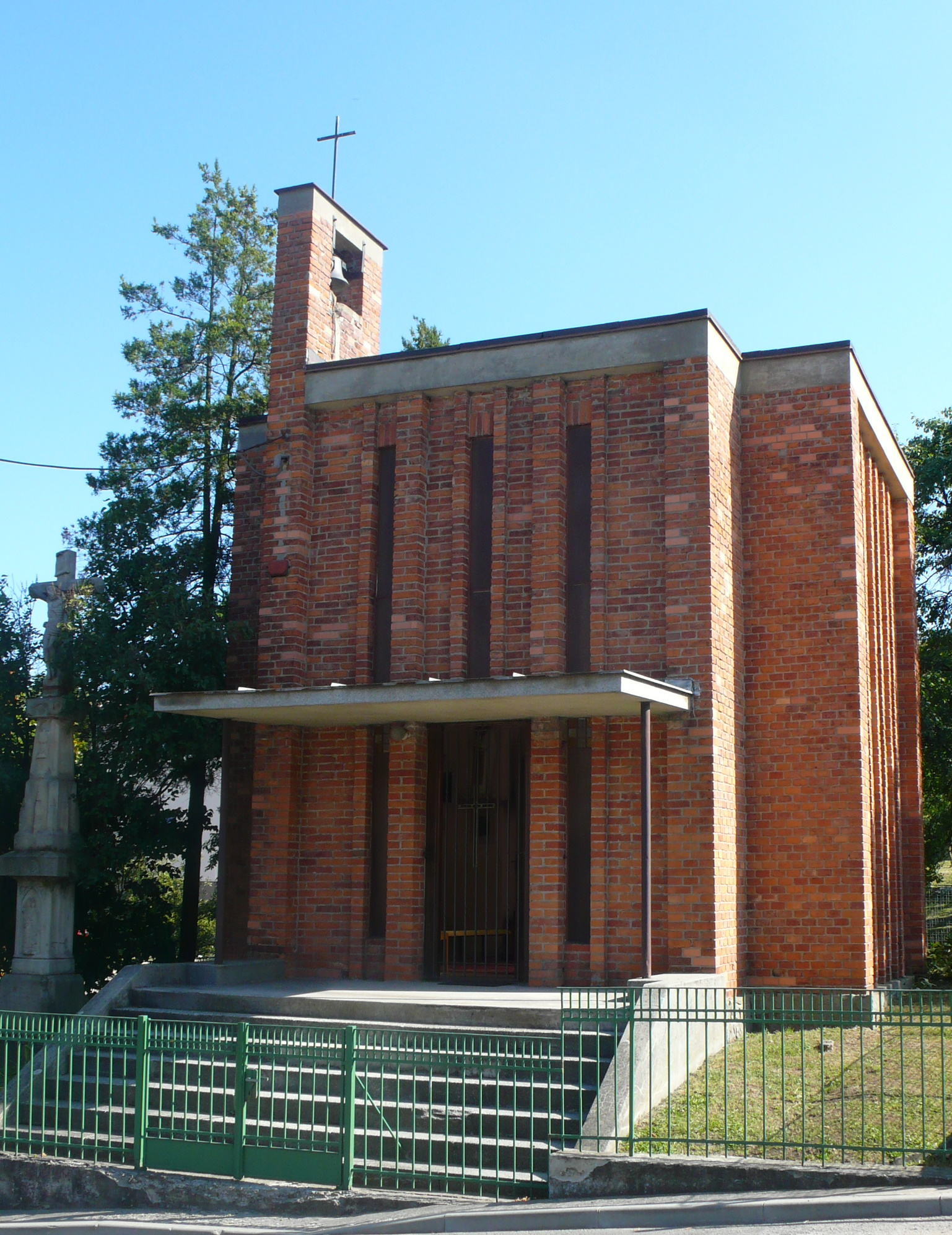 Kaple sv. Václava na Kudlově vysvěcená 22. 9. 1929. Jedno z děl architekta Fr. Lydie Gahury.